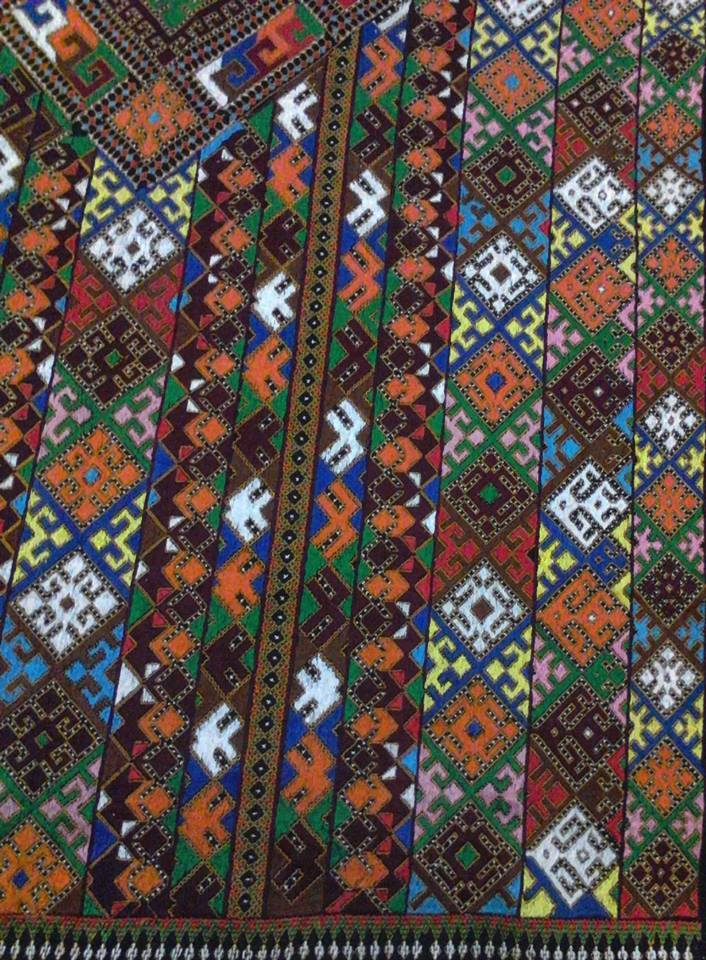 سوزندوزی پرکار بلوچی